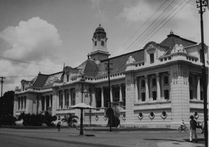 foto. Kantoor van de Javasche Bank in Batavia